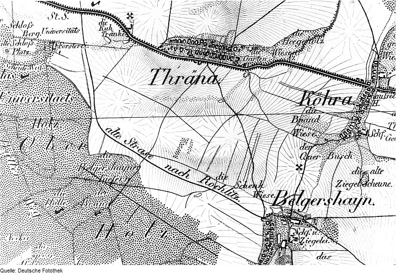 Original image description from the Deutsche Fotothek Belgershain-Köhra. Oberreit, Sect. Leipzig, 1836/39